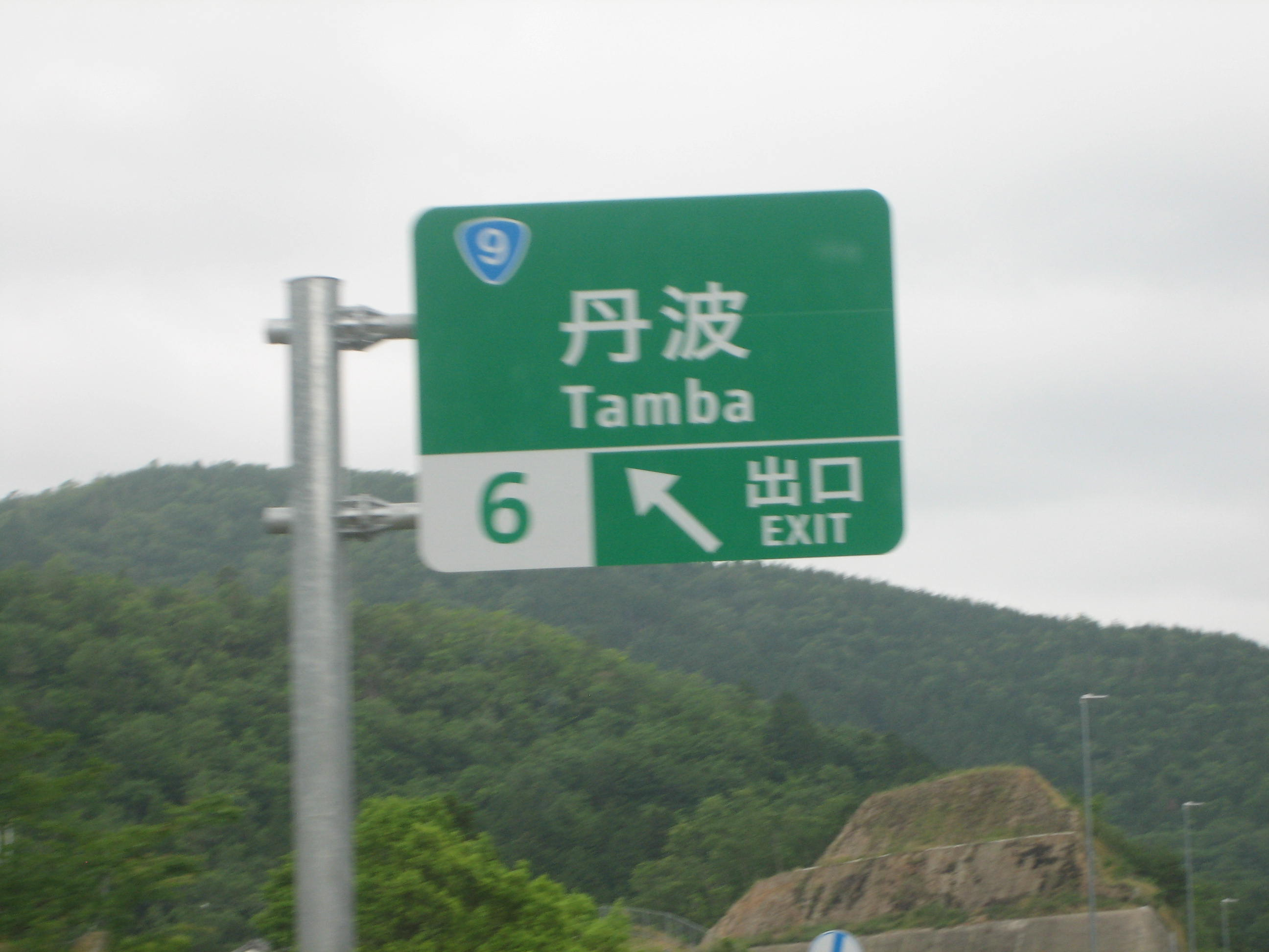 丹波IC